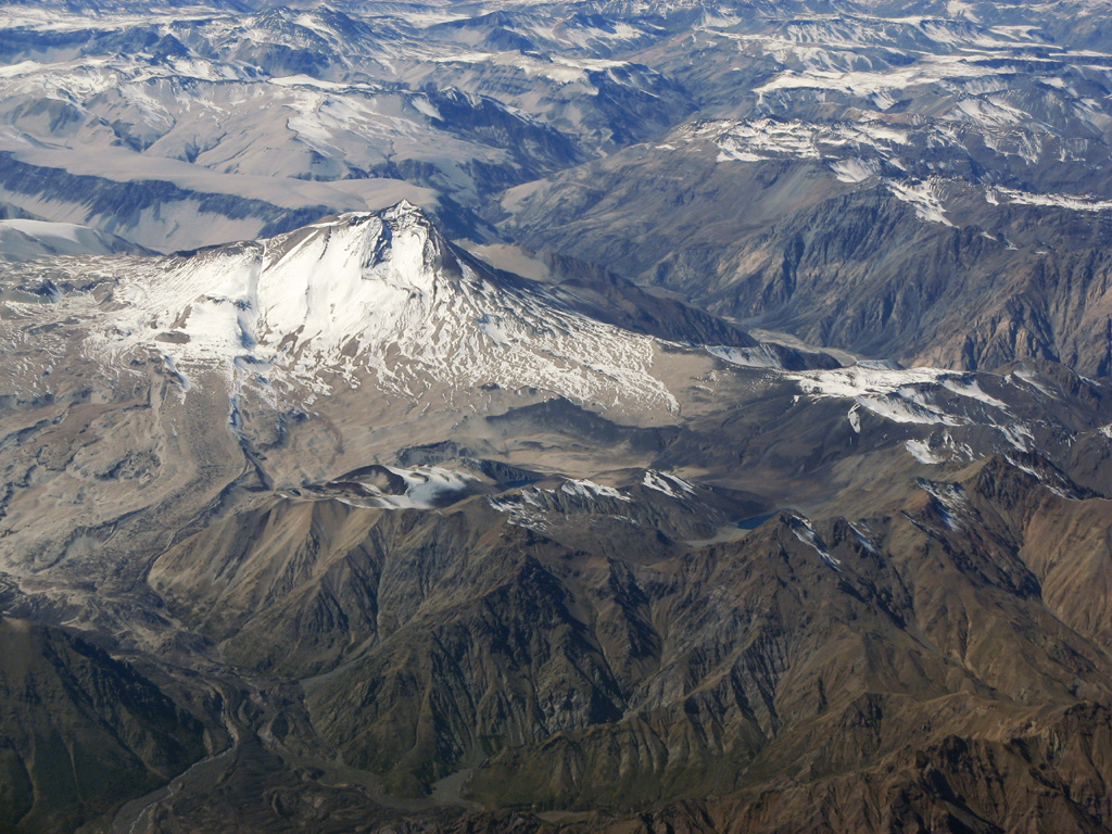 Cerro Azul volcano, Chile.